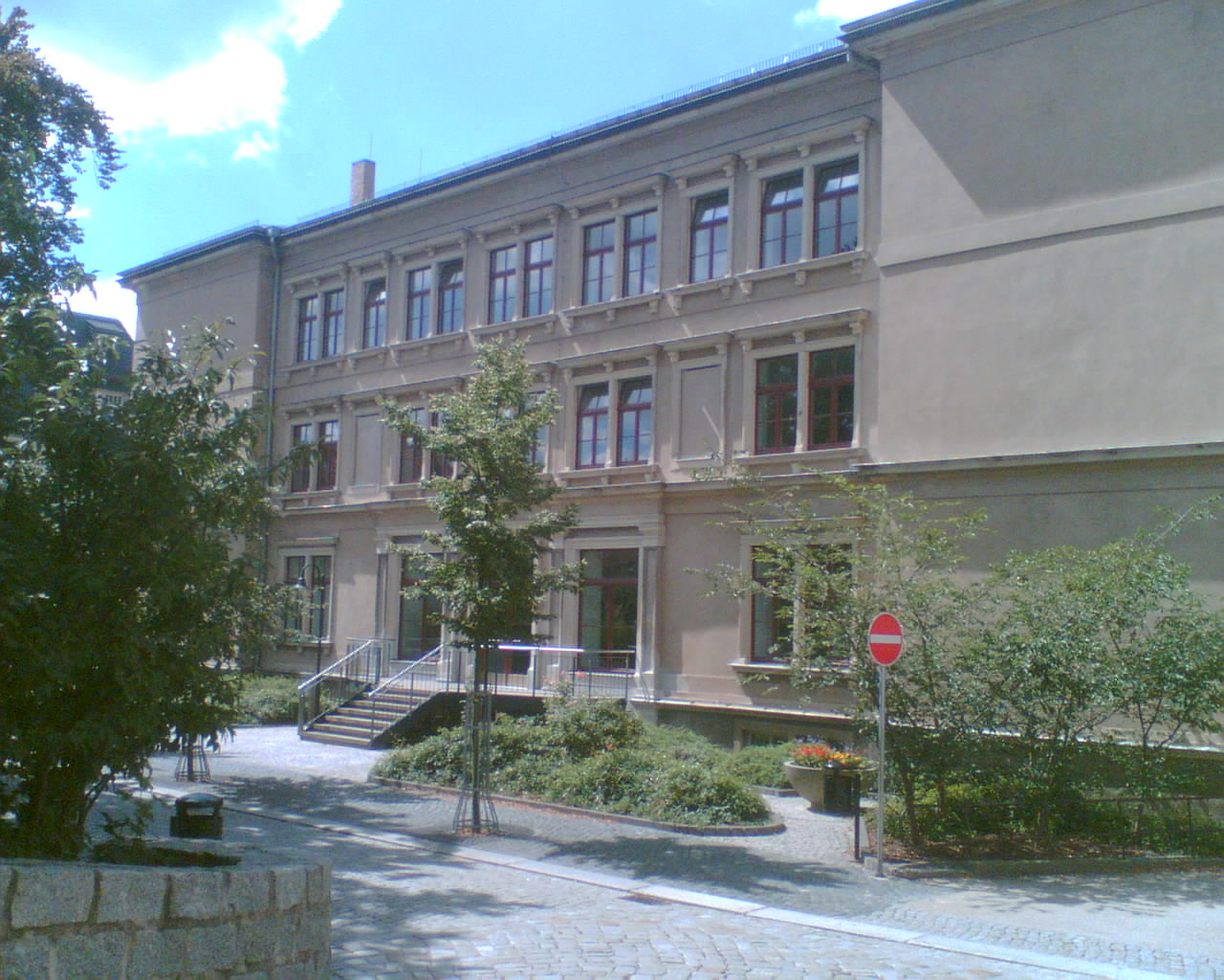 Grundschule Stadtmitte in Radeberg, früher Erich-Weinert Oberschule